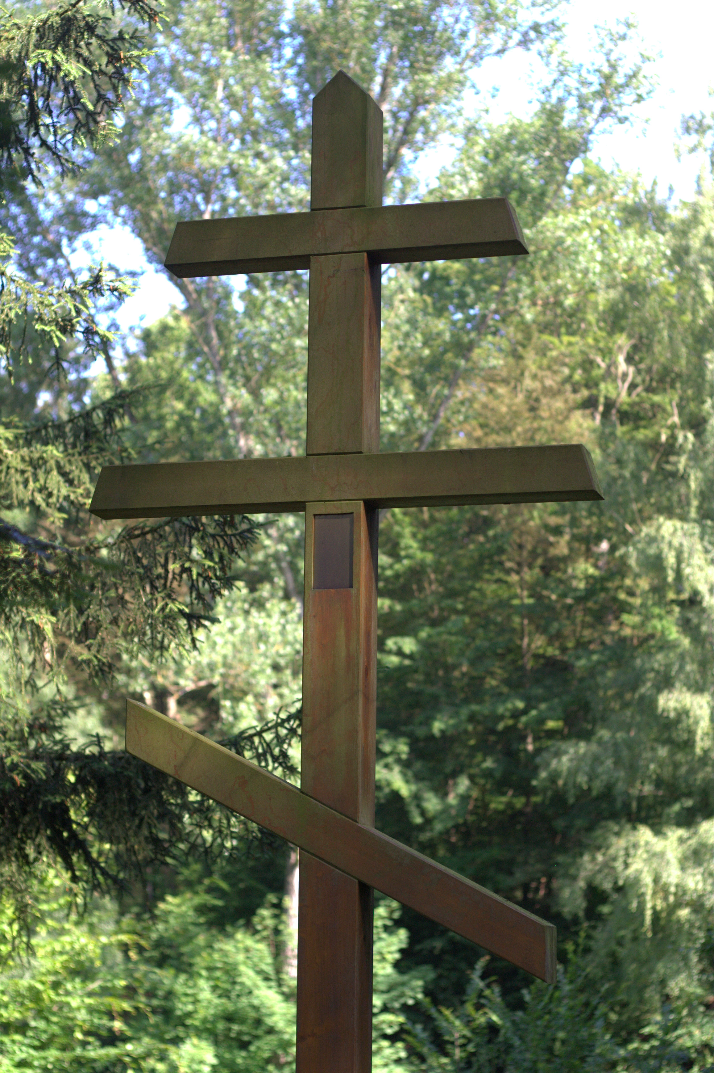 Russisch-Orthodoxes Kreuz zur Erinnerung an die verstorbenen französischen Kriegsgefangenen des STALAG IX A Ziegenhain